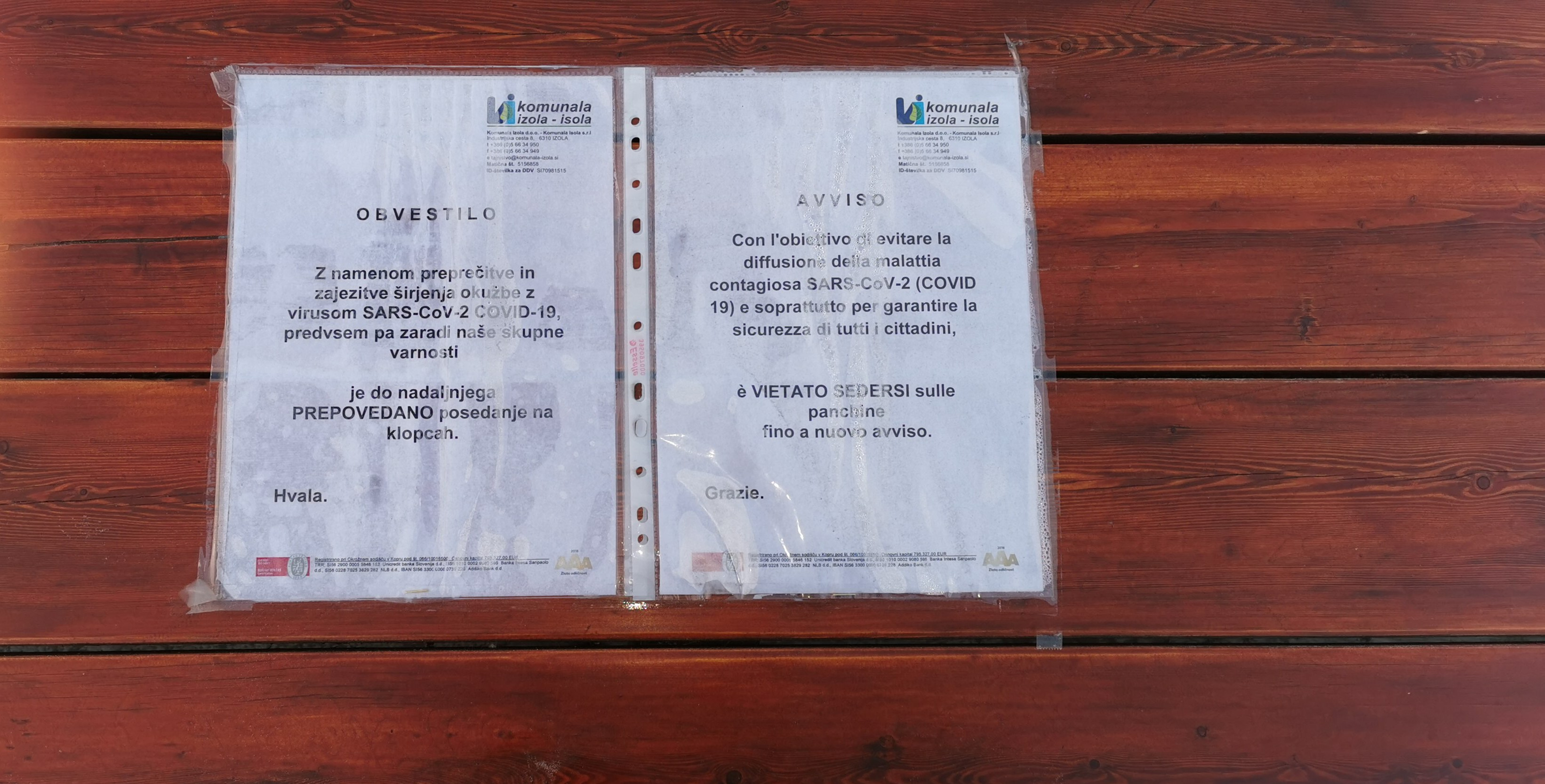 Avviso bilingue sloveno-italiano di divieto d'uso dell'arredo urbano lungo l'ex strada costiera 111 Capodistria-Isola, ora ciclopedonale, a causa dell'emergenza COVID-19, ad Isola, in Slovenia